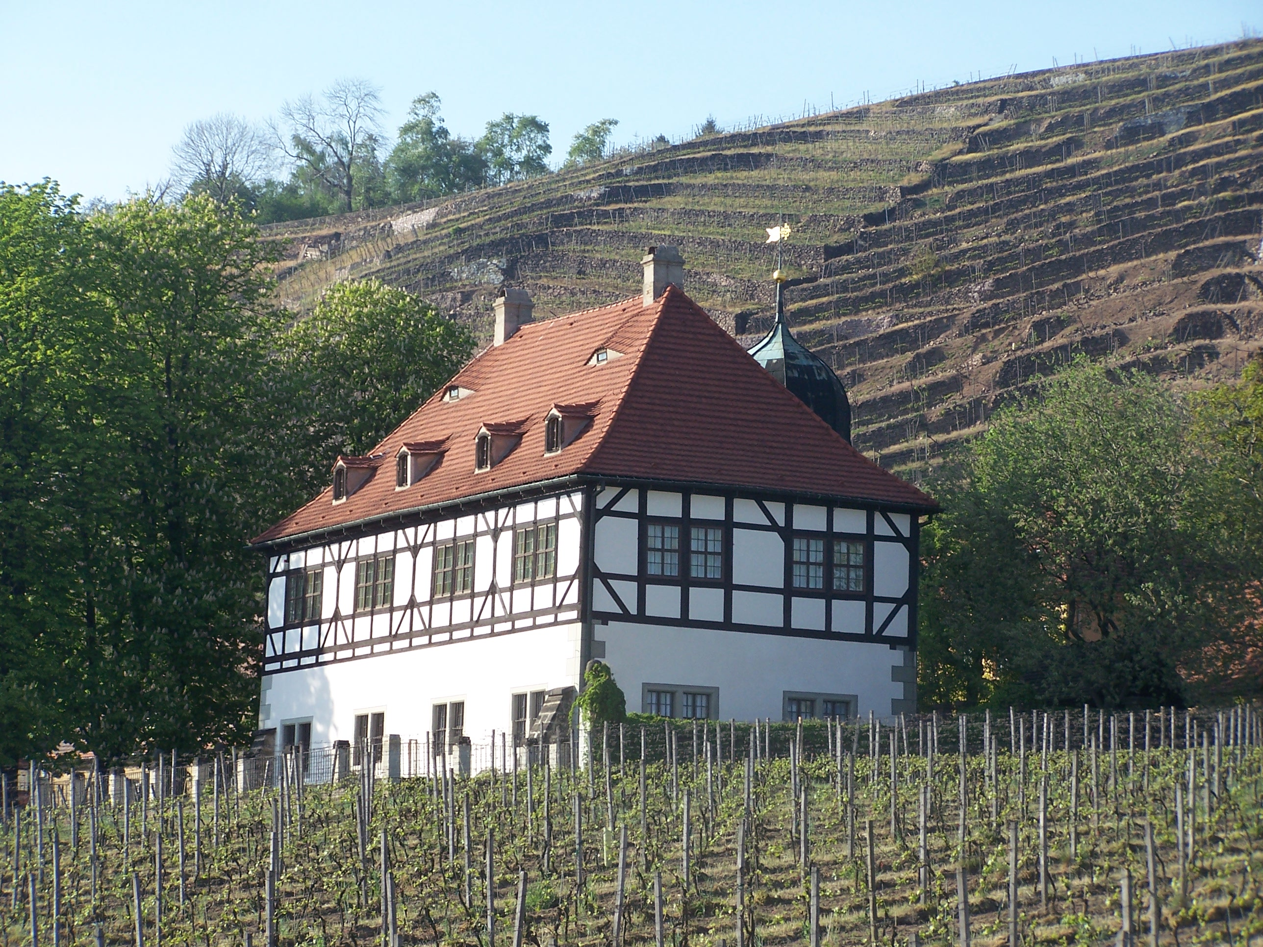 Weingut Hoflößnitz in Radebeul / vineyard Hoflößnitz in Radebeul, Germany